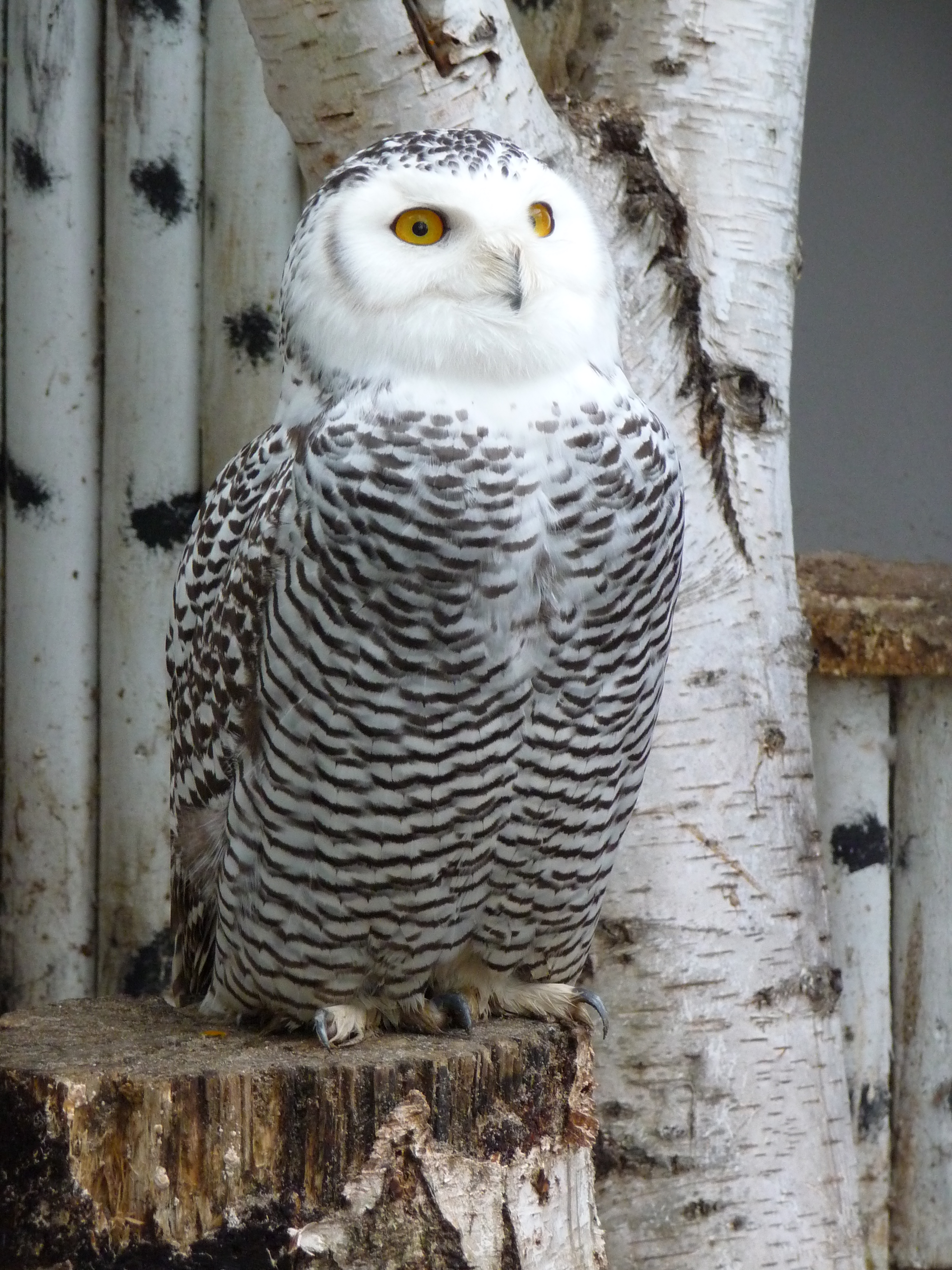 Schnee-Eule Bubo scandiacus, fotografiert im Tier- und Vogelpark Forst e. V. (Baden-Württemberg, Deutschland)